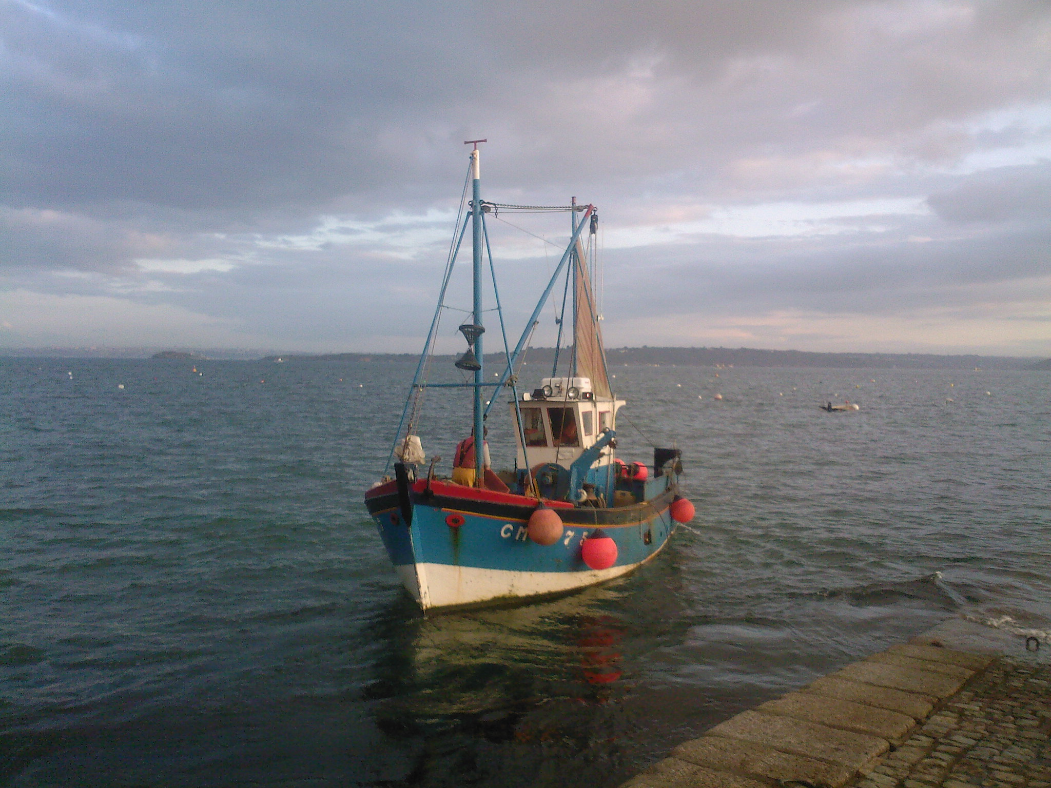 Coquillier de la rade de Brest (Finistère)